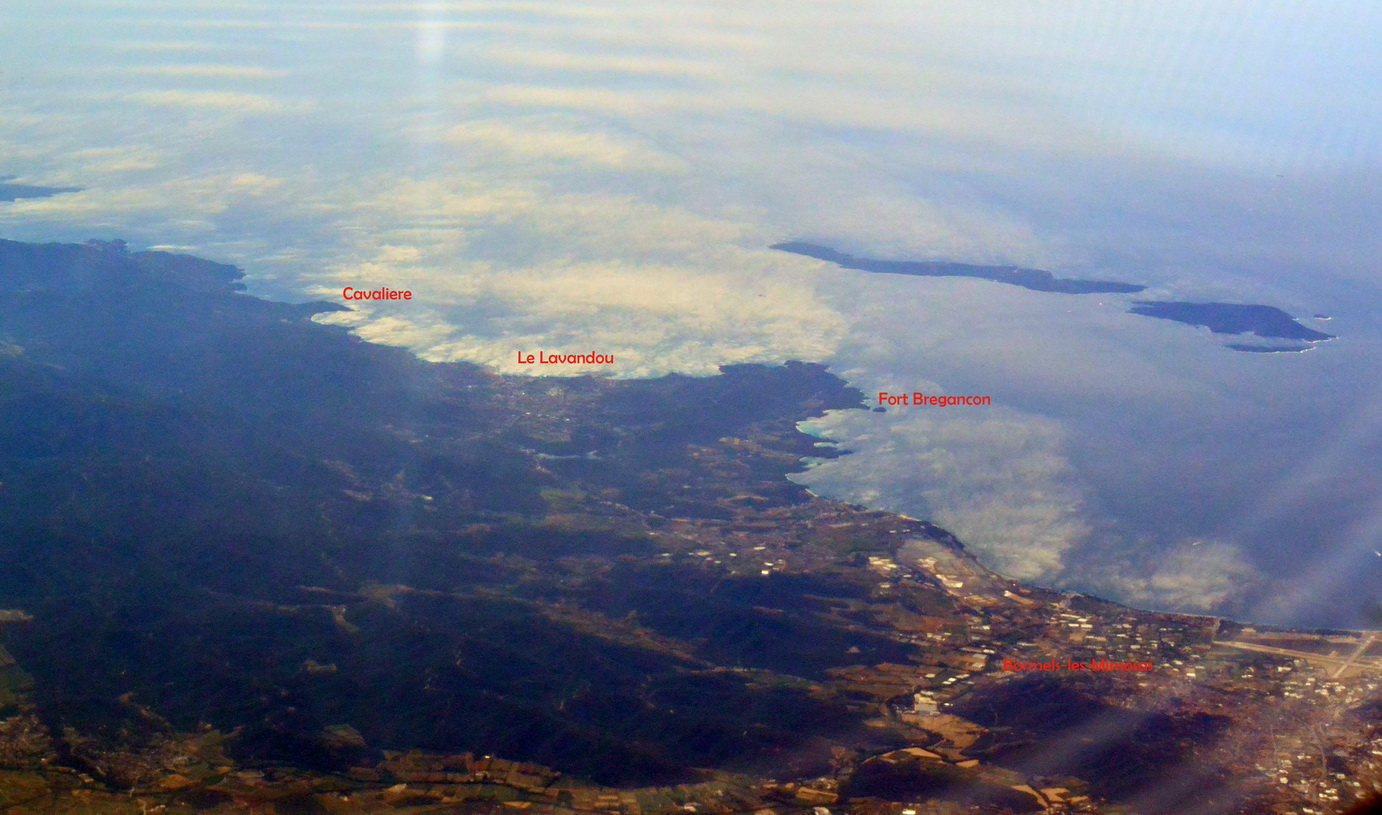 Le Lavandou und die Hyerischen Inseln